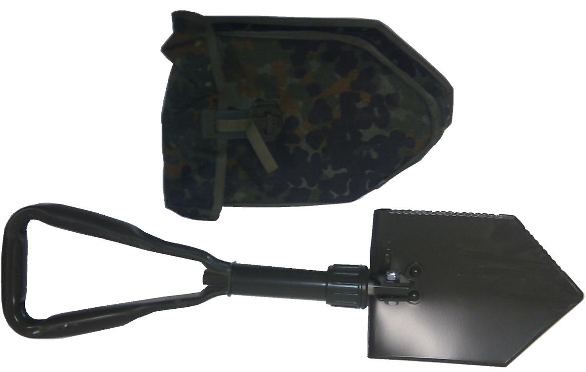 Feldspaten der Bundeswehr mit 5-Farben-Tarndruck-Koppeltasche